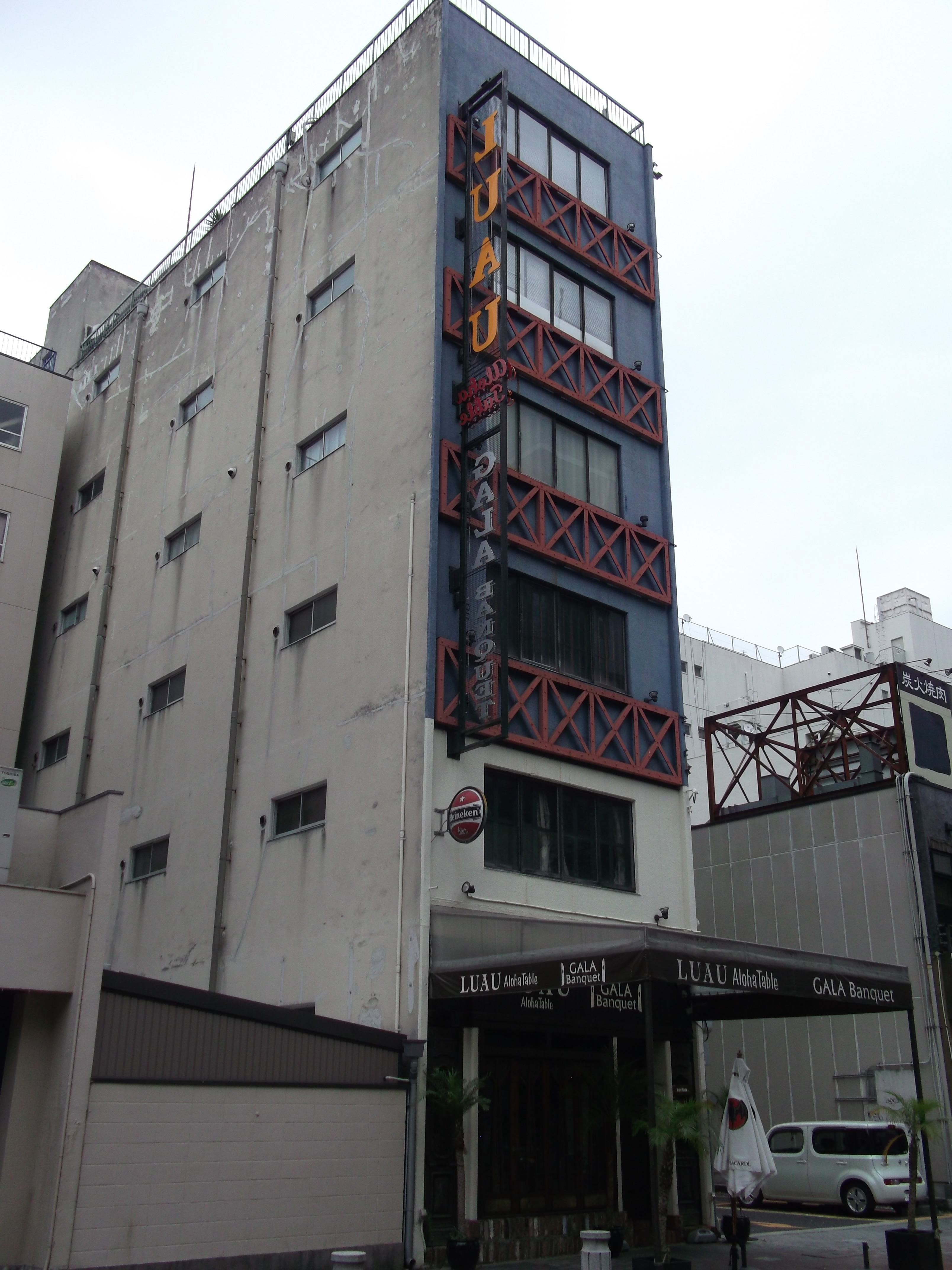 名古屋市中区栄三丁目のzettonBLDGを南側公道西側より撮影